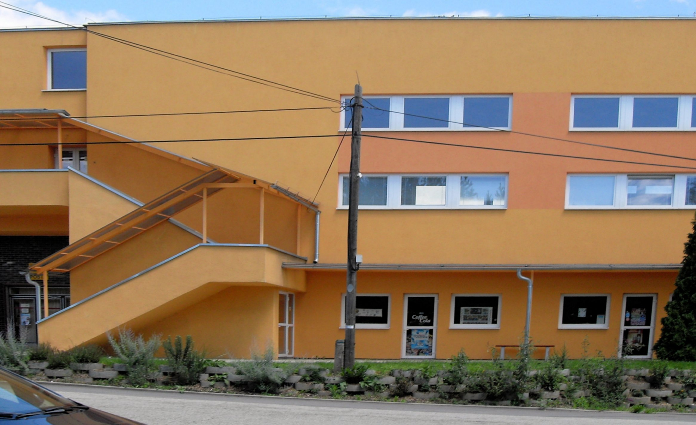 Obecný úrad v Šemša